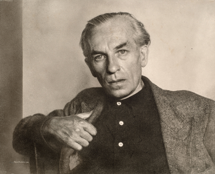 Professor Hans Grundig, 1946. Foto von Hugo Erfurth, Silbergelatine, 23,4 x 29,2 cm